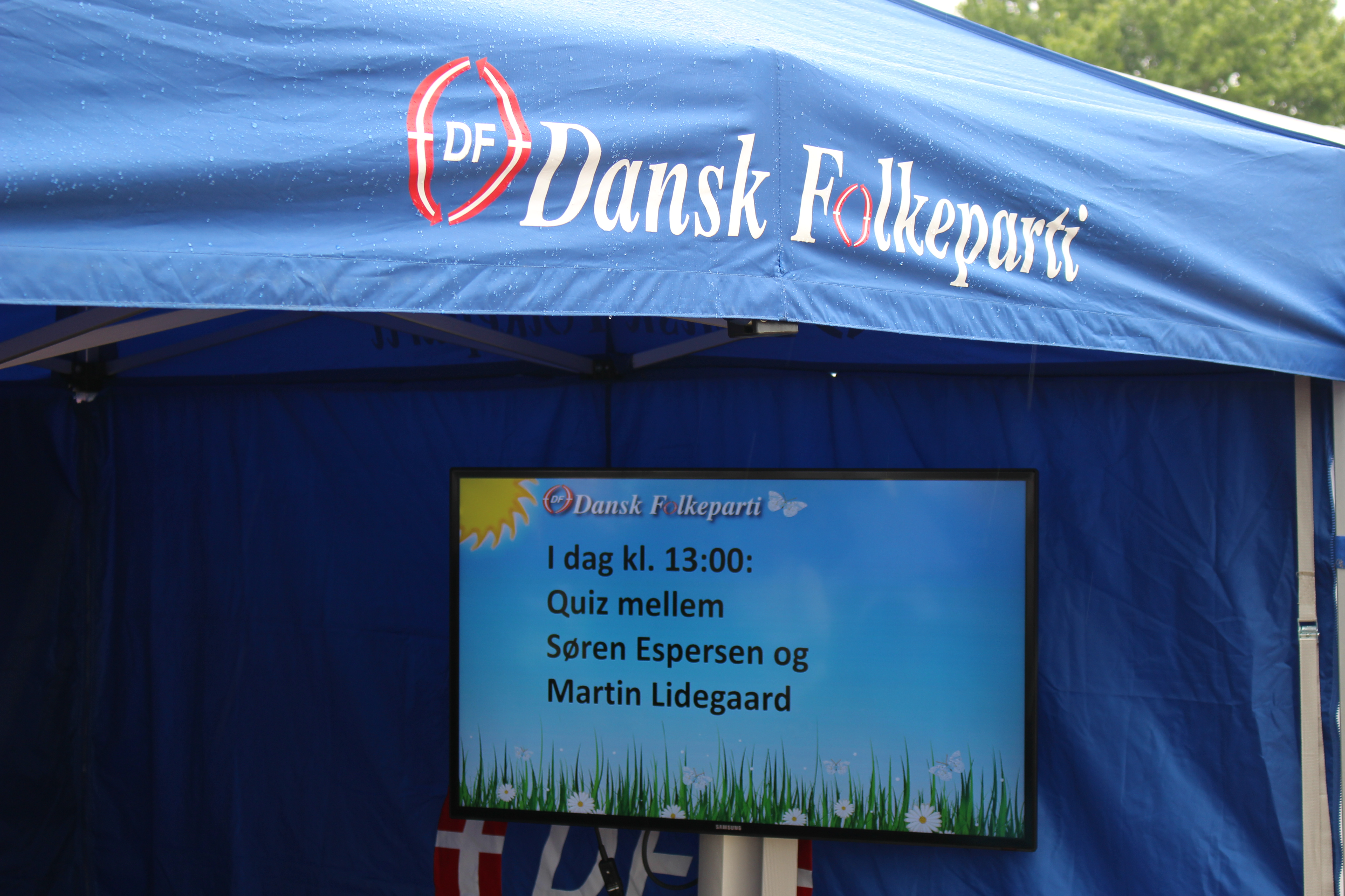 Dansk Folkepartis telt under Folkemødet 2016 med skærm der annoncerer "I dag kl. 13:00: Quiz mellem Søren Espersen og Martin Lidegaard"